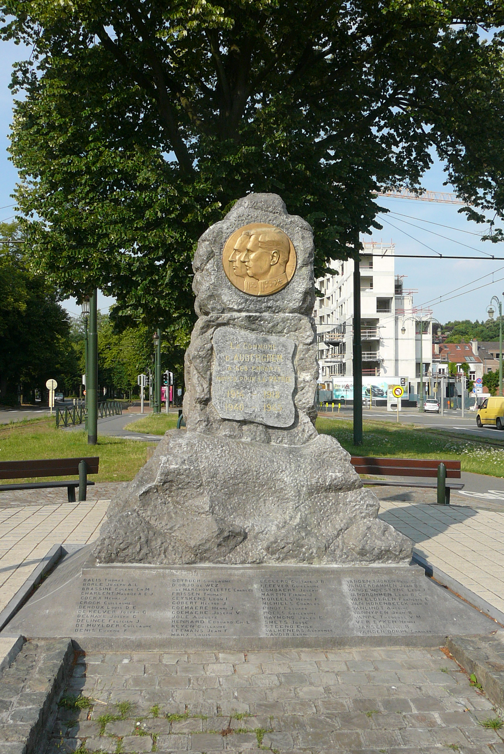 Mémorial du Rond-Point du Souverain, à Auderghem, commémorant les victimes des deux guerres mondiales.